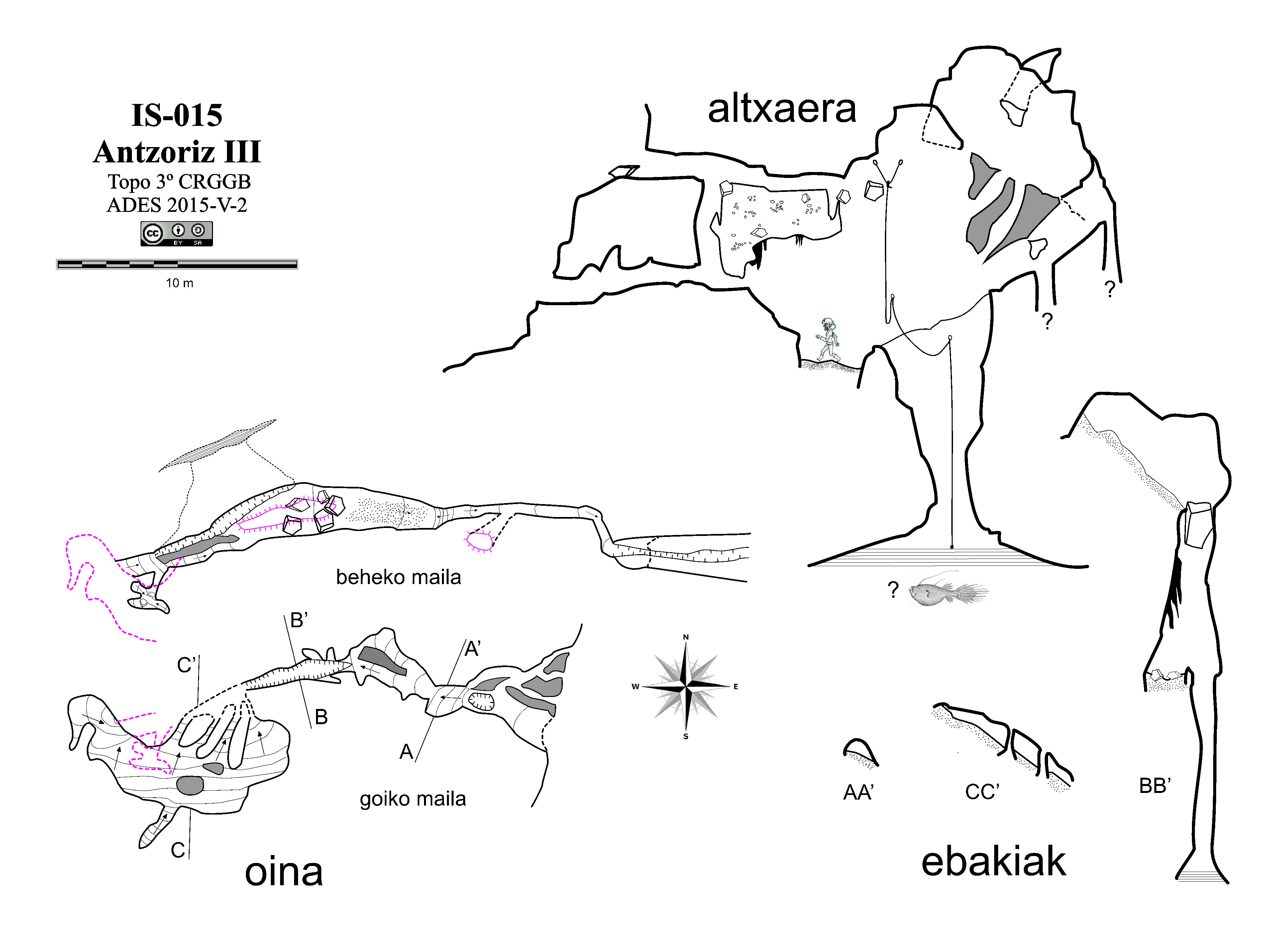 Antzoriz III kobazuloa (Lekeitio). 2015 urteko topografia.